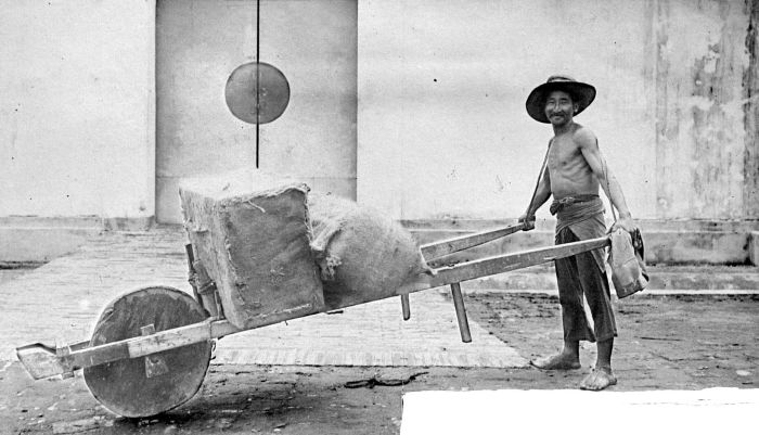 Repronegatief. Drager met kruiwagen